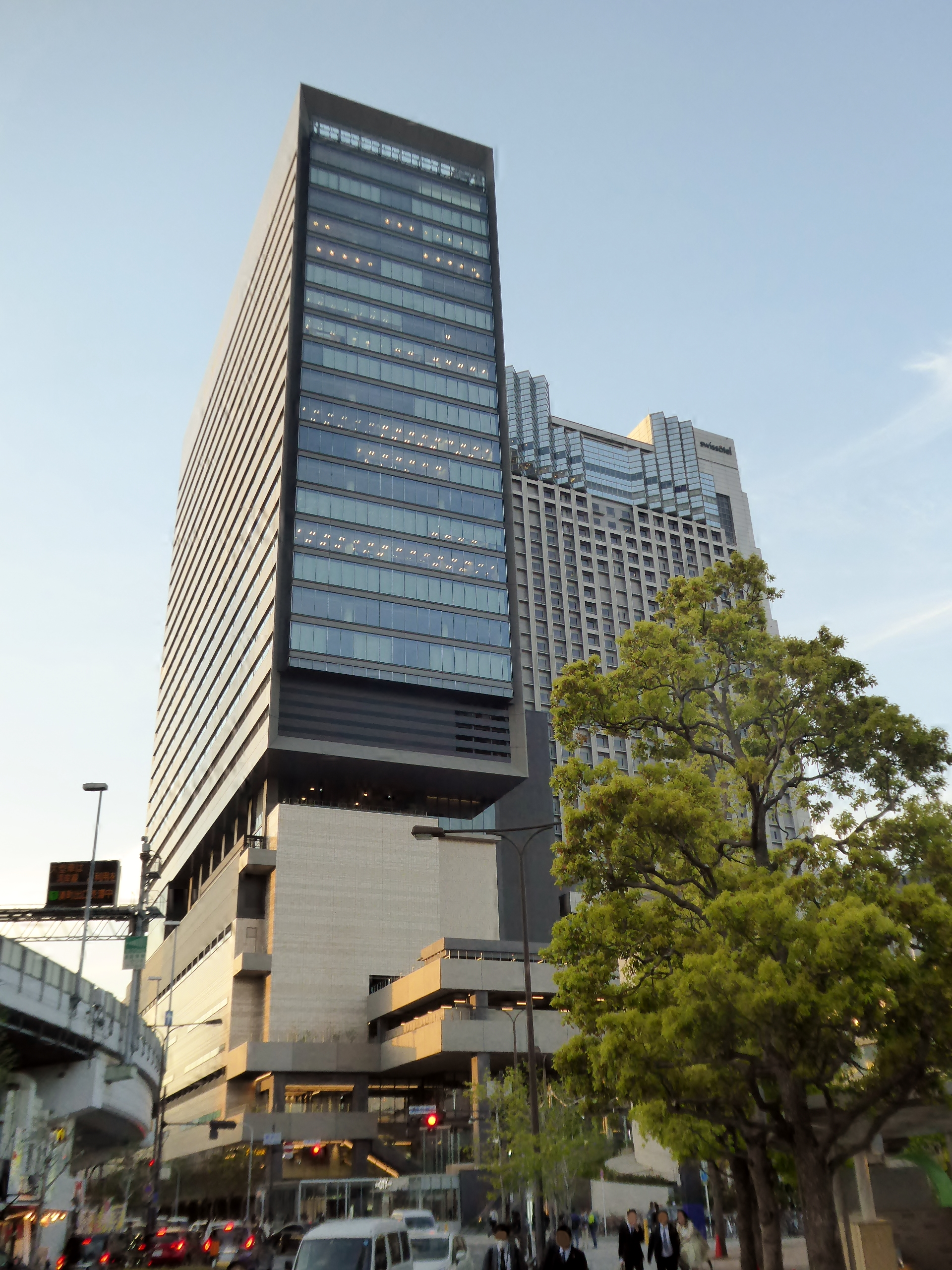 2019年4月26日時点のなんばスカイオを撮影。